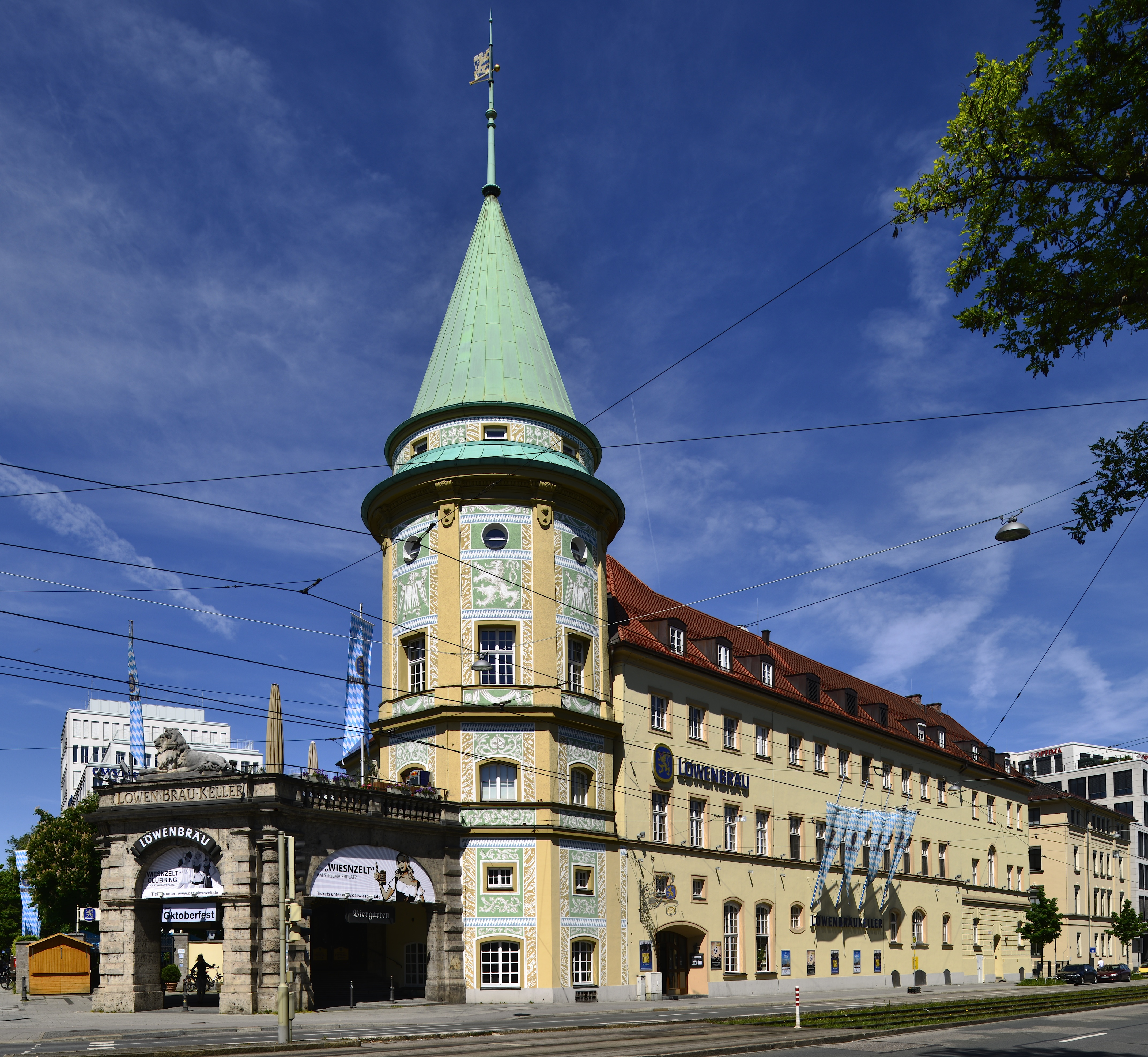 München. Fassadenansicht des Löwenbräukellers am Stiglmaierplatz, Ecke Nymphenburger und Dachauer Straße.